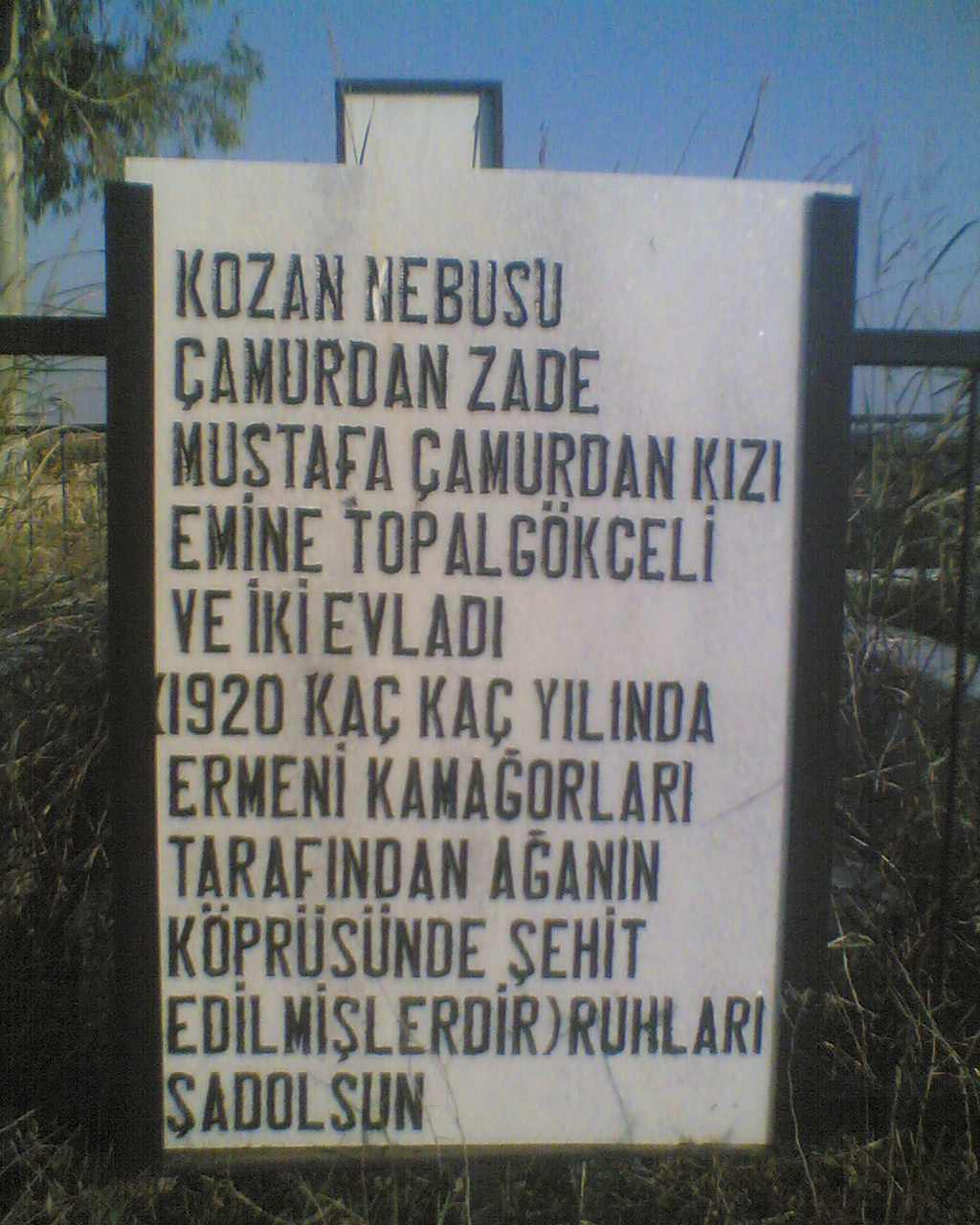 Adana iline bağlı İmamoğlu ilçesinde bulunan Ağzıkaraca köyünden bir görüntü.